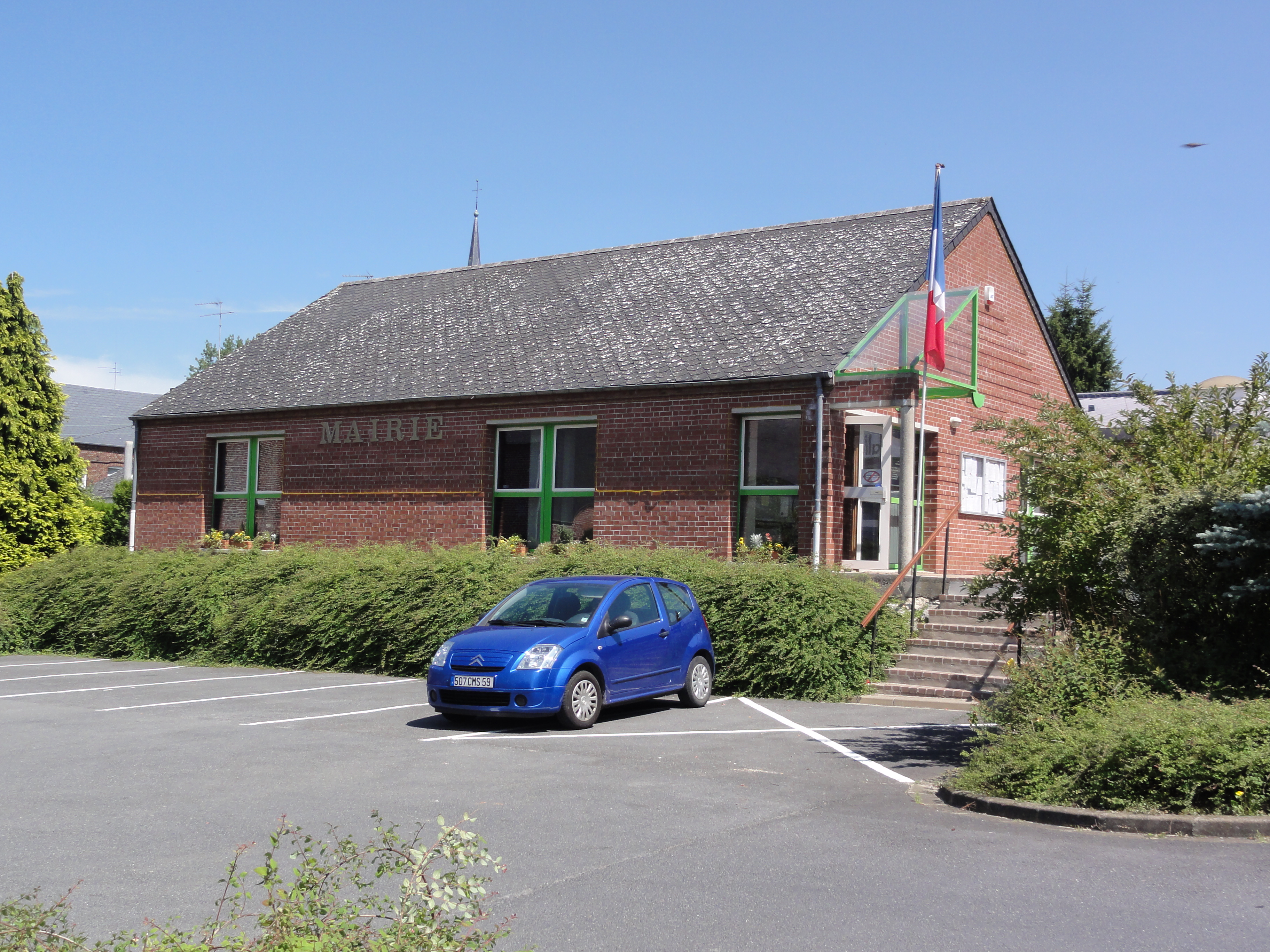 Sars-Poteries (Nord, Fr) mairie